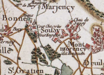 Soisy-sous-Montmorency (France) - Carte de Cassini, vers 1780